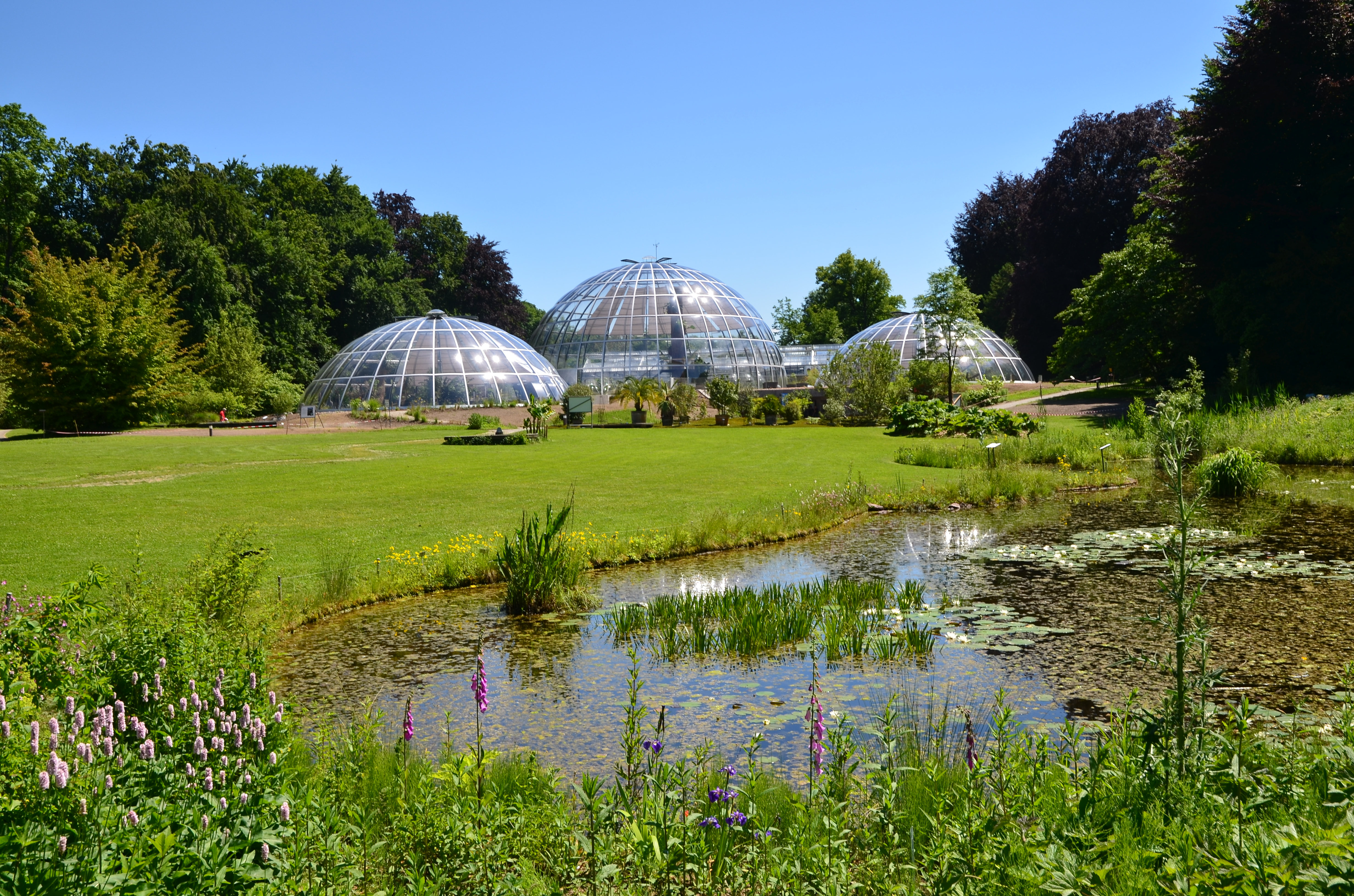 Botanischer Garten der Universität Zürich in Zürich-Weinegg